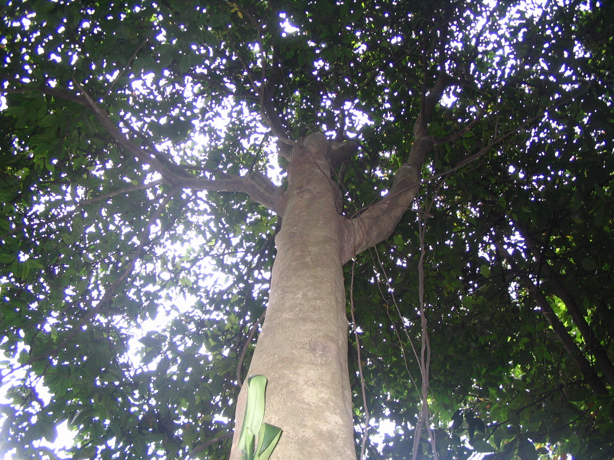 Archidendron bulbalinum - Bukit Nanas forest reserve Kuala Lumpur Malaisie